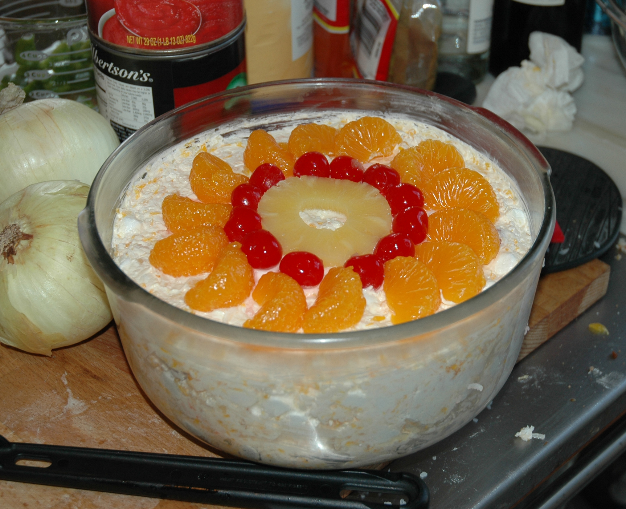 Coconut ambrosia salad